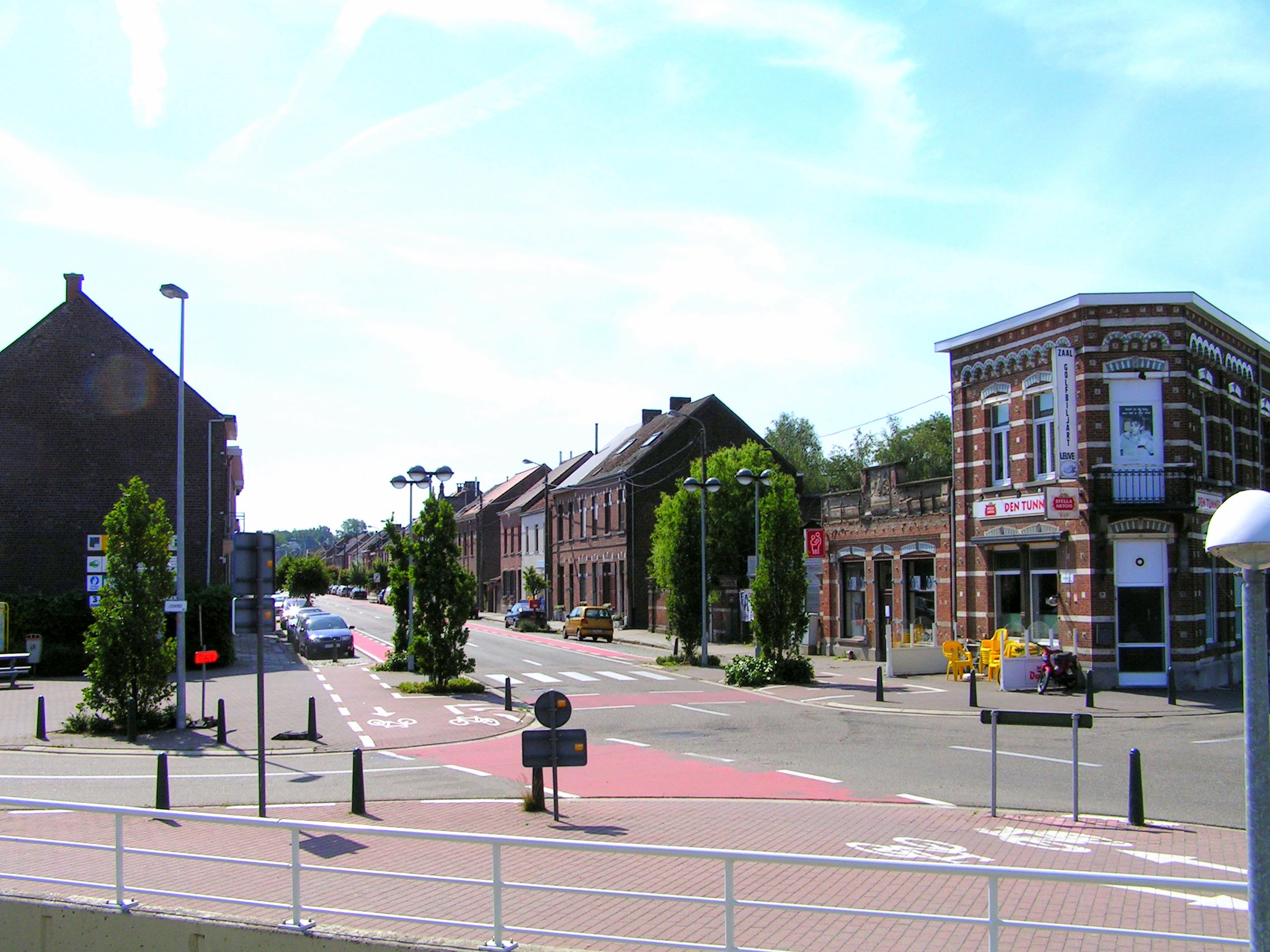 Mechelsesteenweg, Herent, Belgium